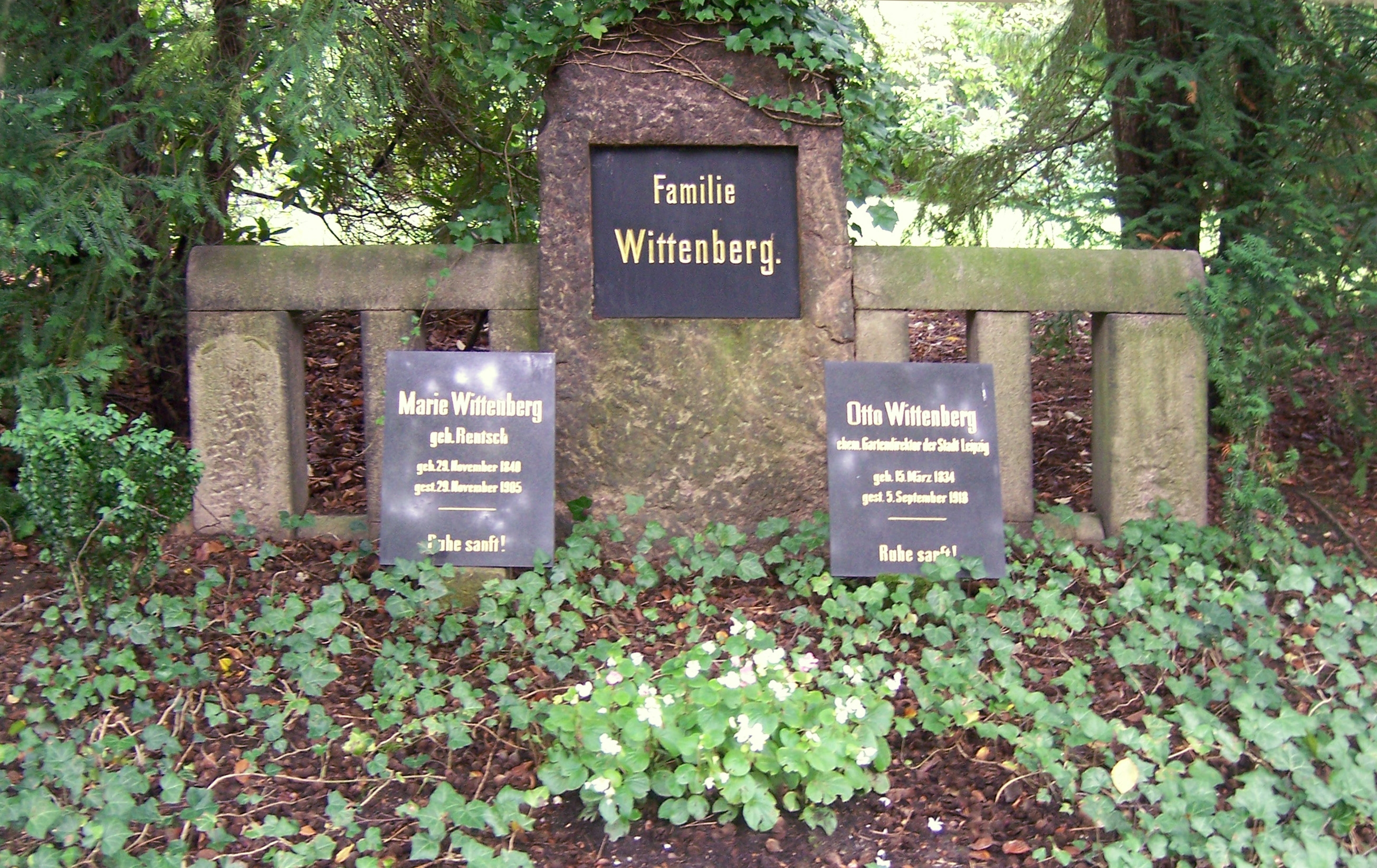 Grabstätte Familie Otto Wittenberg